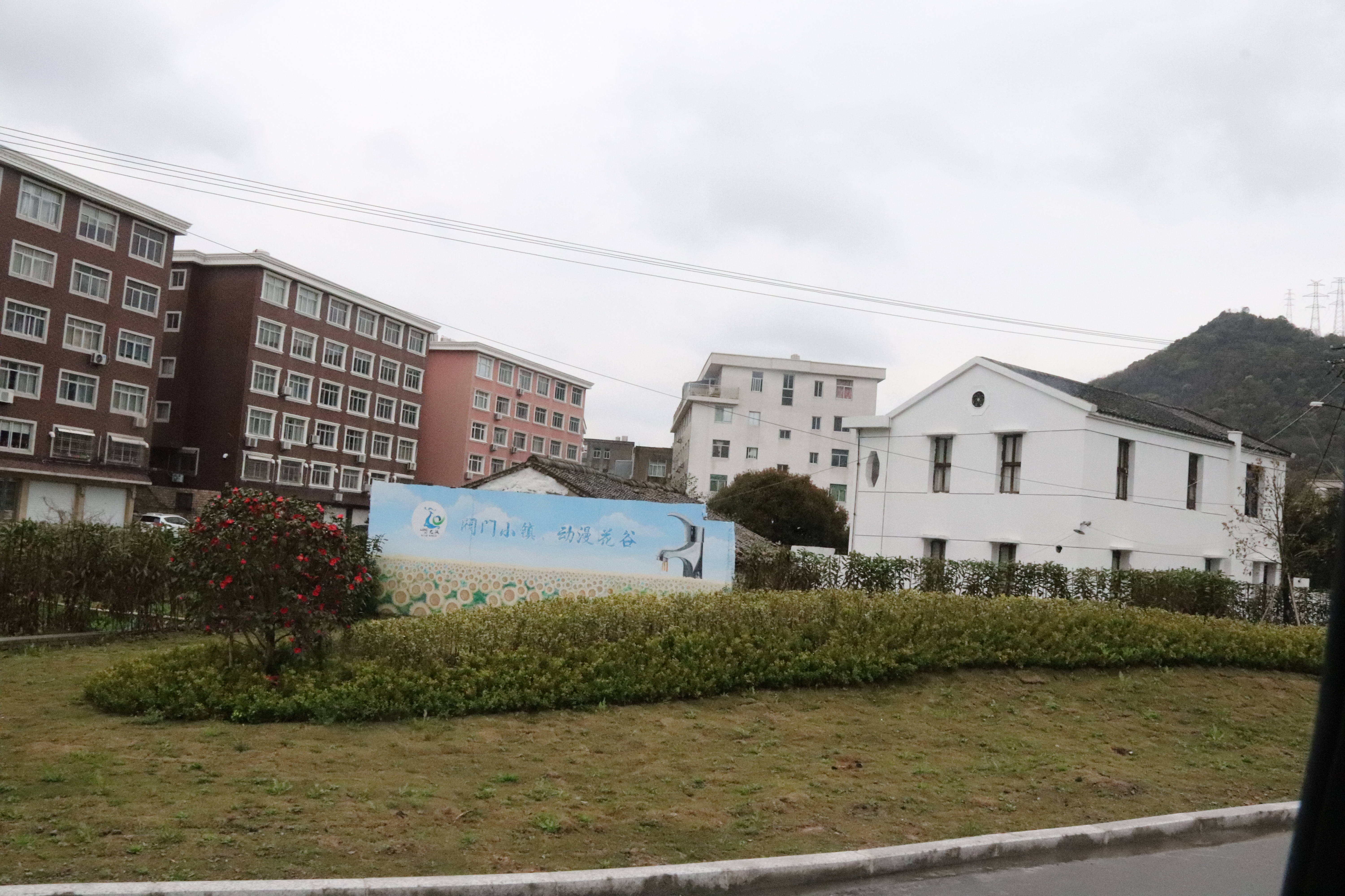 中文（中国大陆）: 浙江省玉环市龙溪镇一角